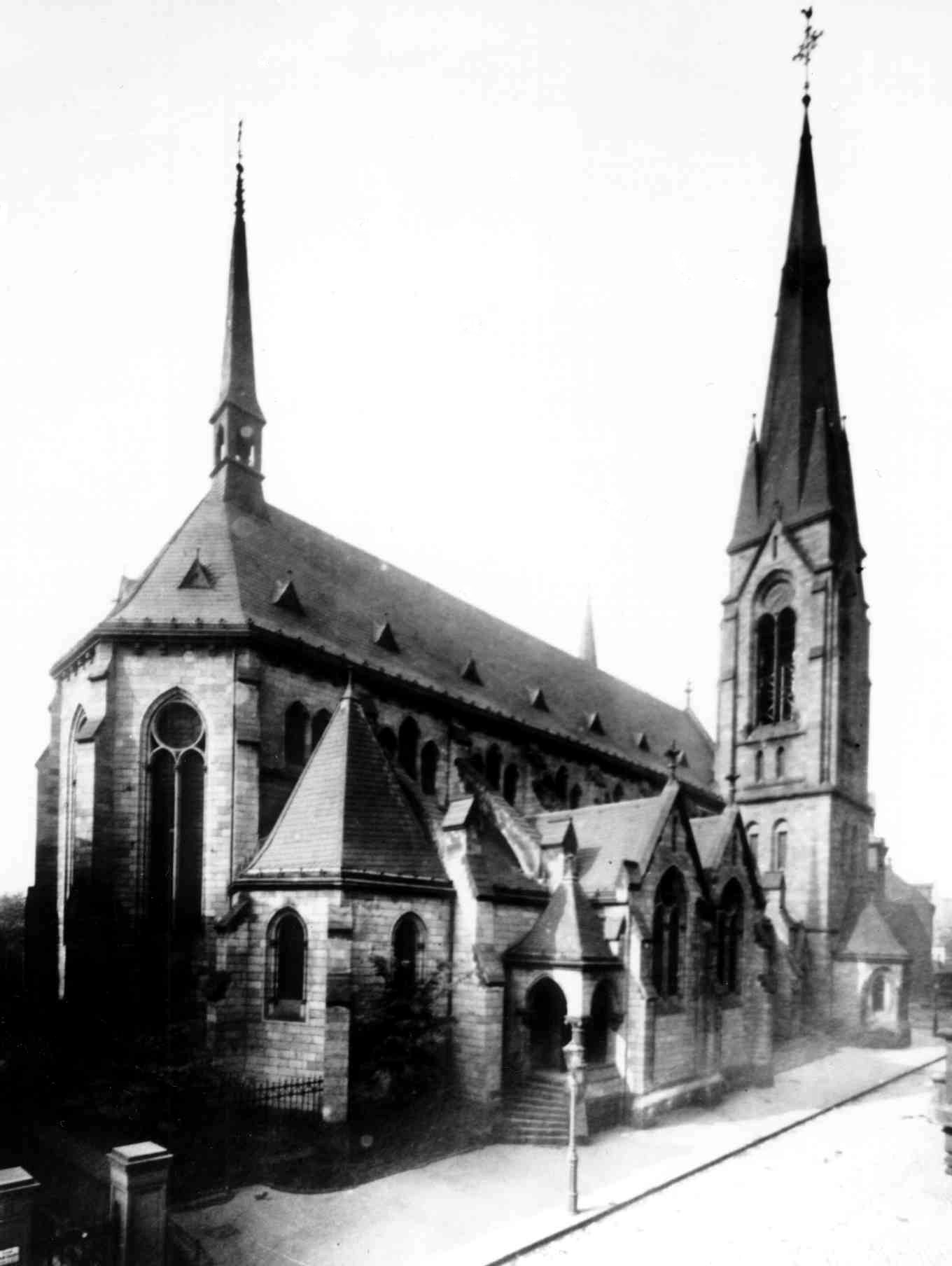 Ehemalige Sankt Josephskirche in Essen, Foto Nordostseite Ottilienstraße, um 1895, zerstört 1943.